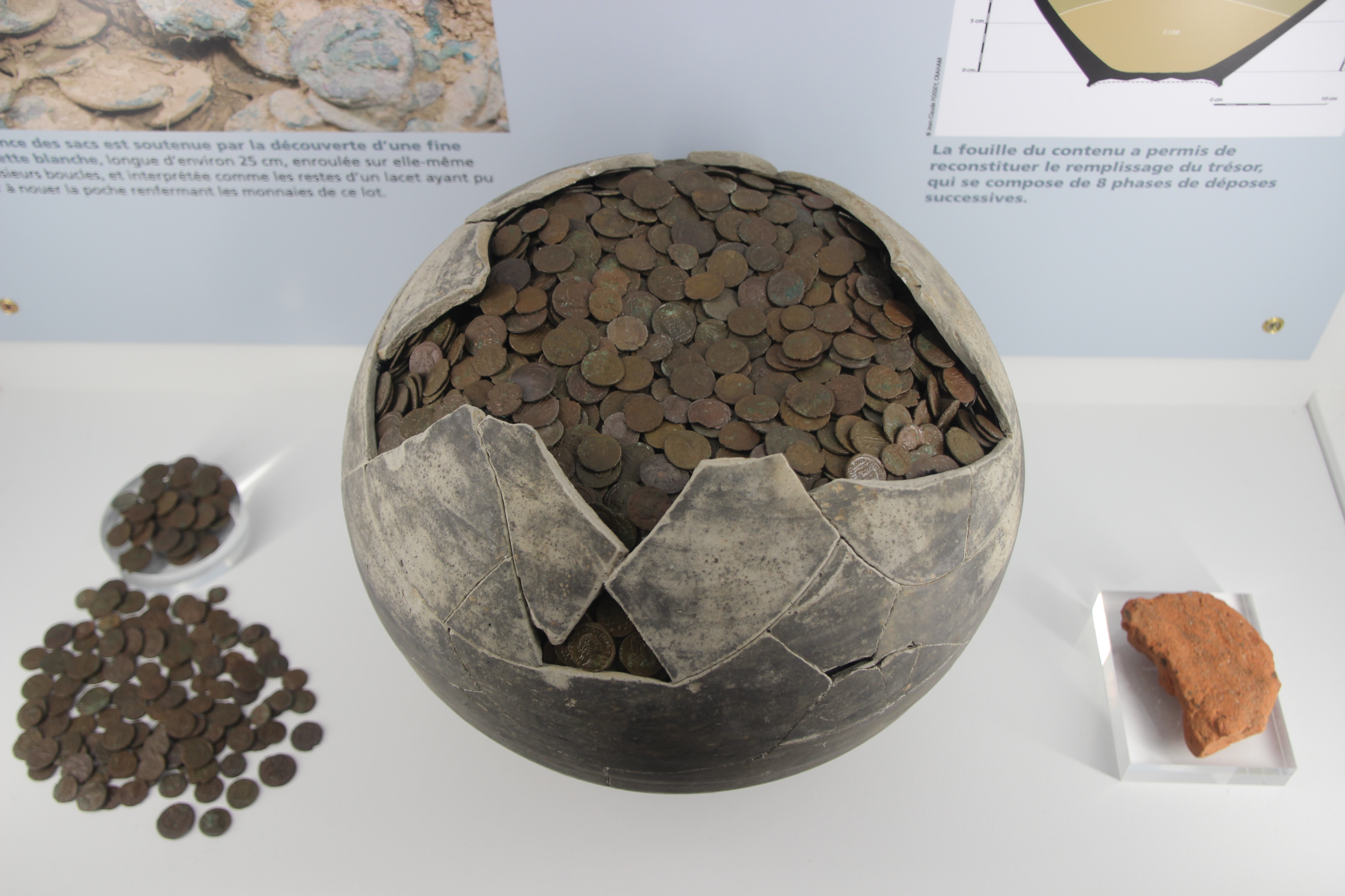 Trésor de Saint-Germain-de-Varreville au Musée de Normandie à Caen